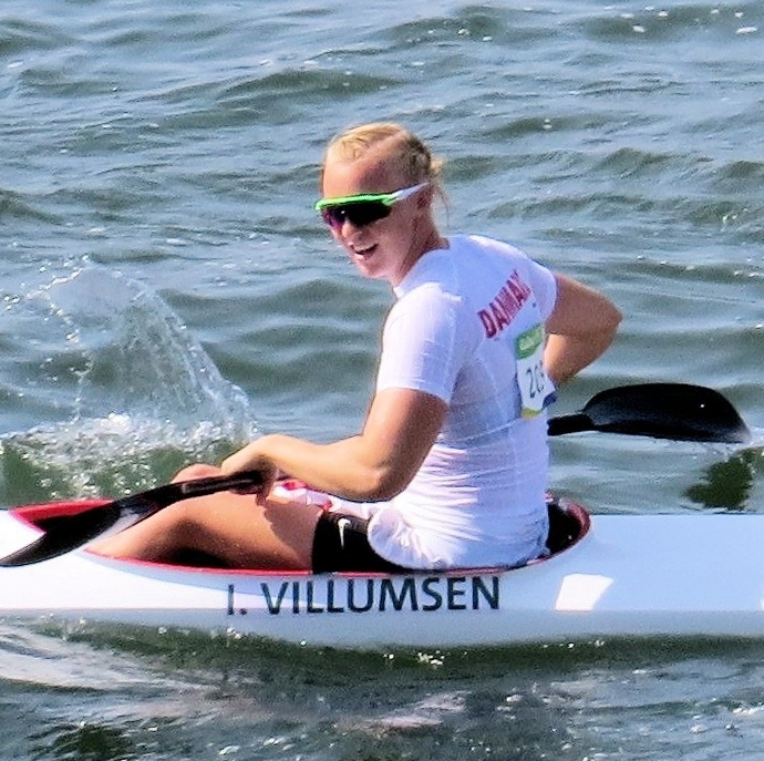 Sx50